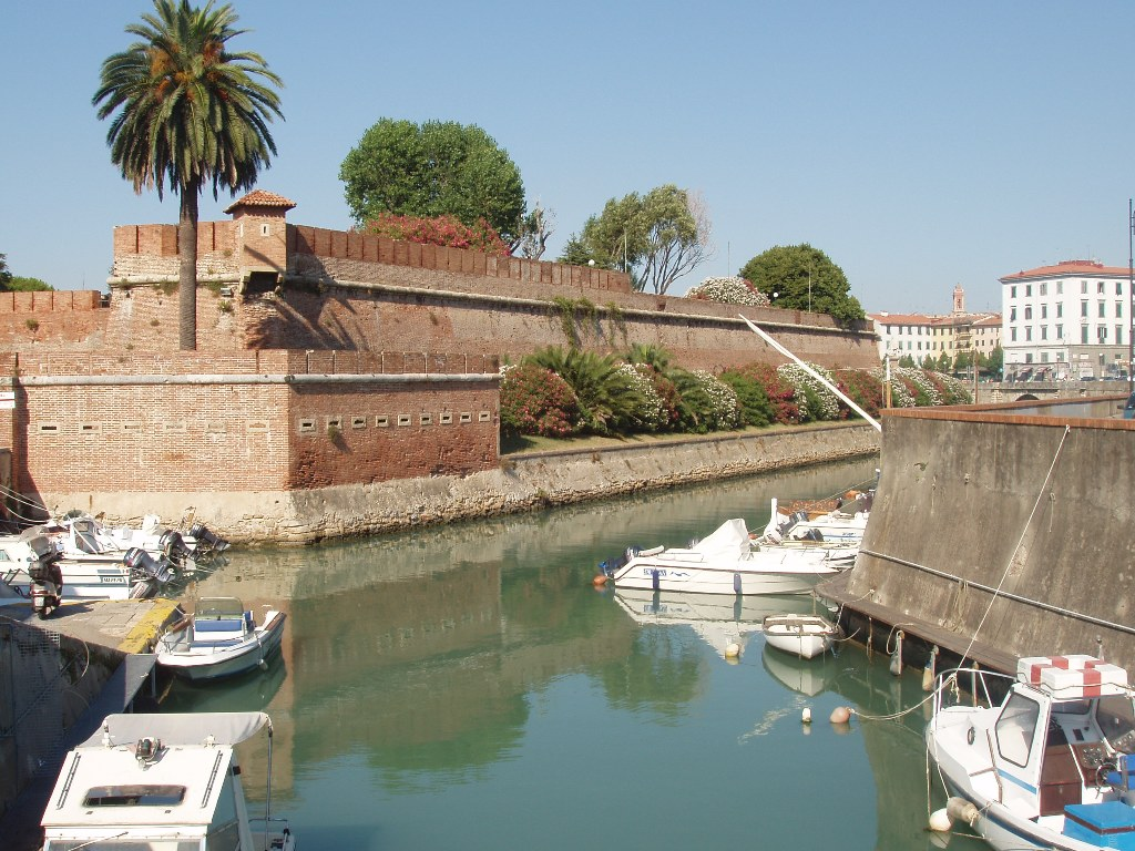 Livorno, Italy: Fortezza Nuova ("New Fortress")